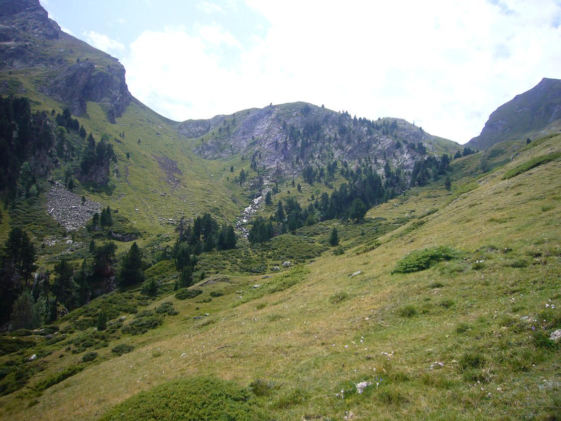 Barranc del Montanyó, la Vall de Boí, Alta Ribagorça, Catalunya.